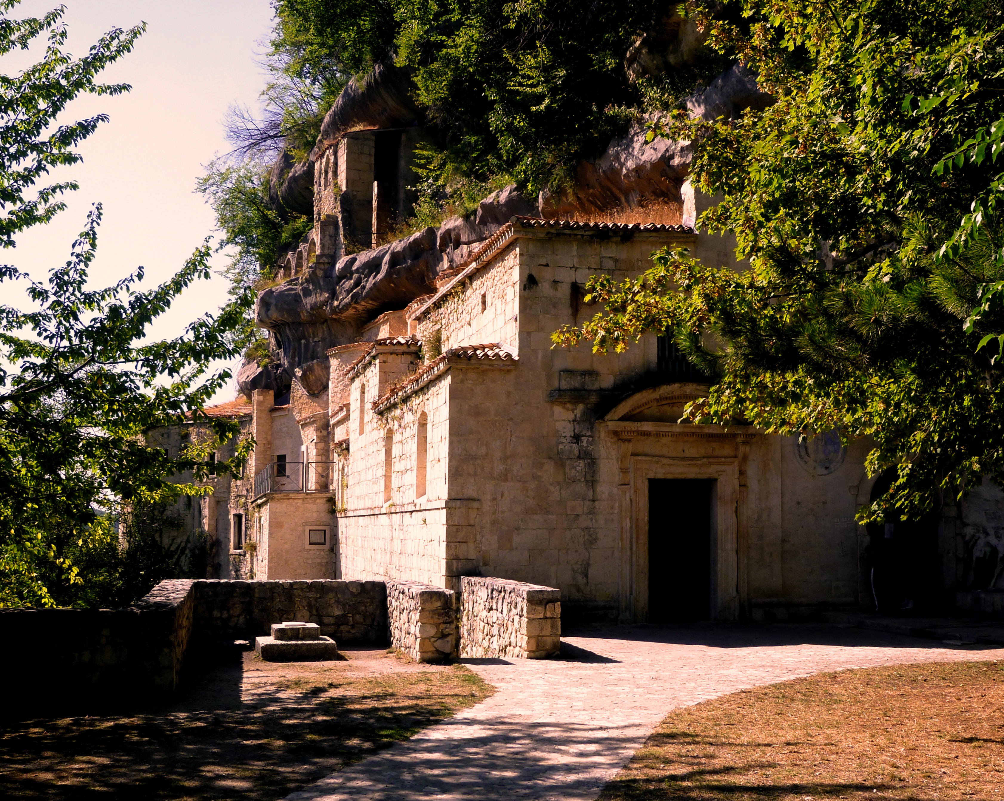 Veduta dell'eremo di Santo Spirito a Majella. Roccamorice, Pescara.